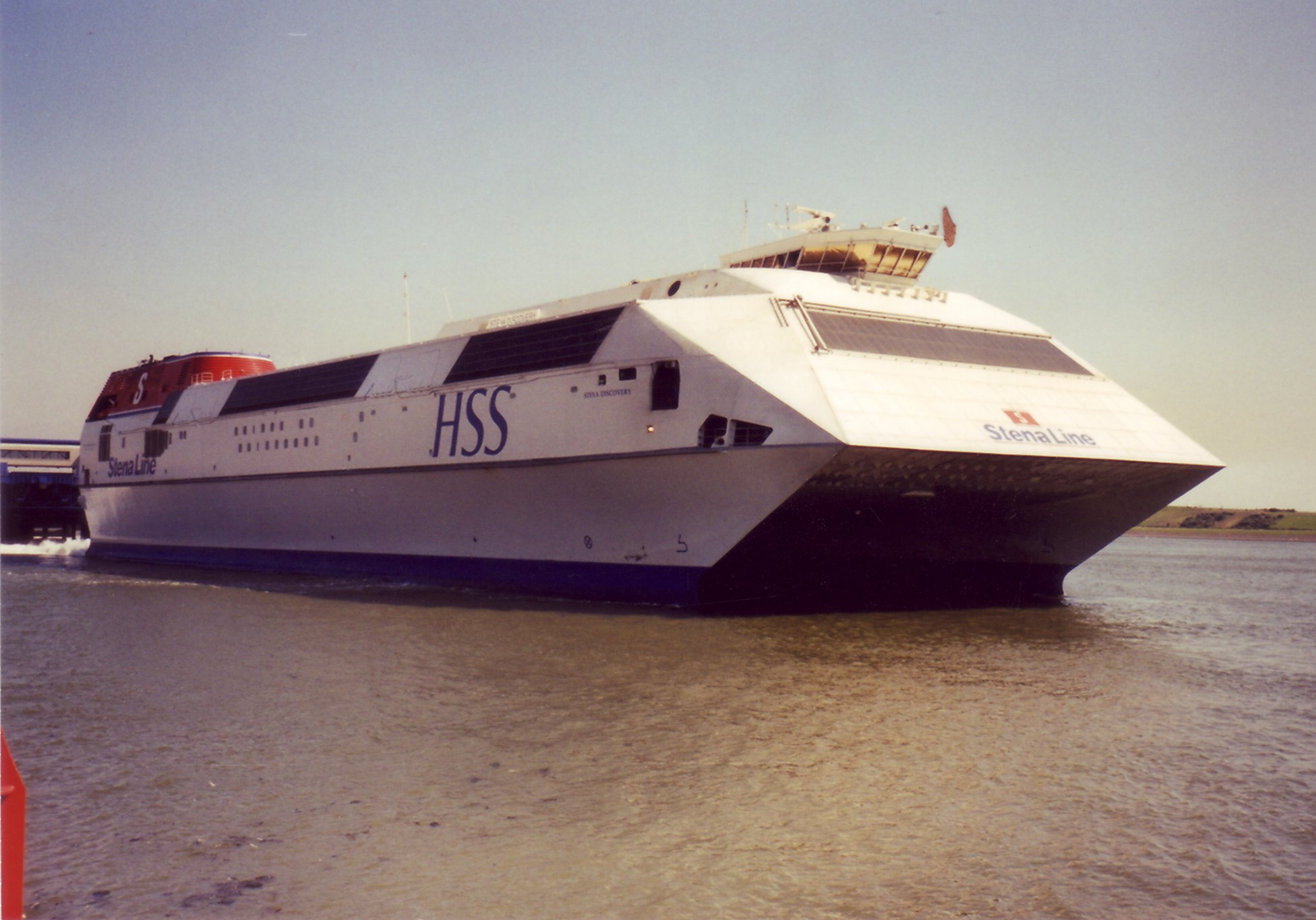 Der Katamaran Stena Discovery der Reederei Stena im Hafen von Hoek van Holland Fotografiert von Benutzer:Albion im Juli 2002